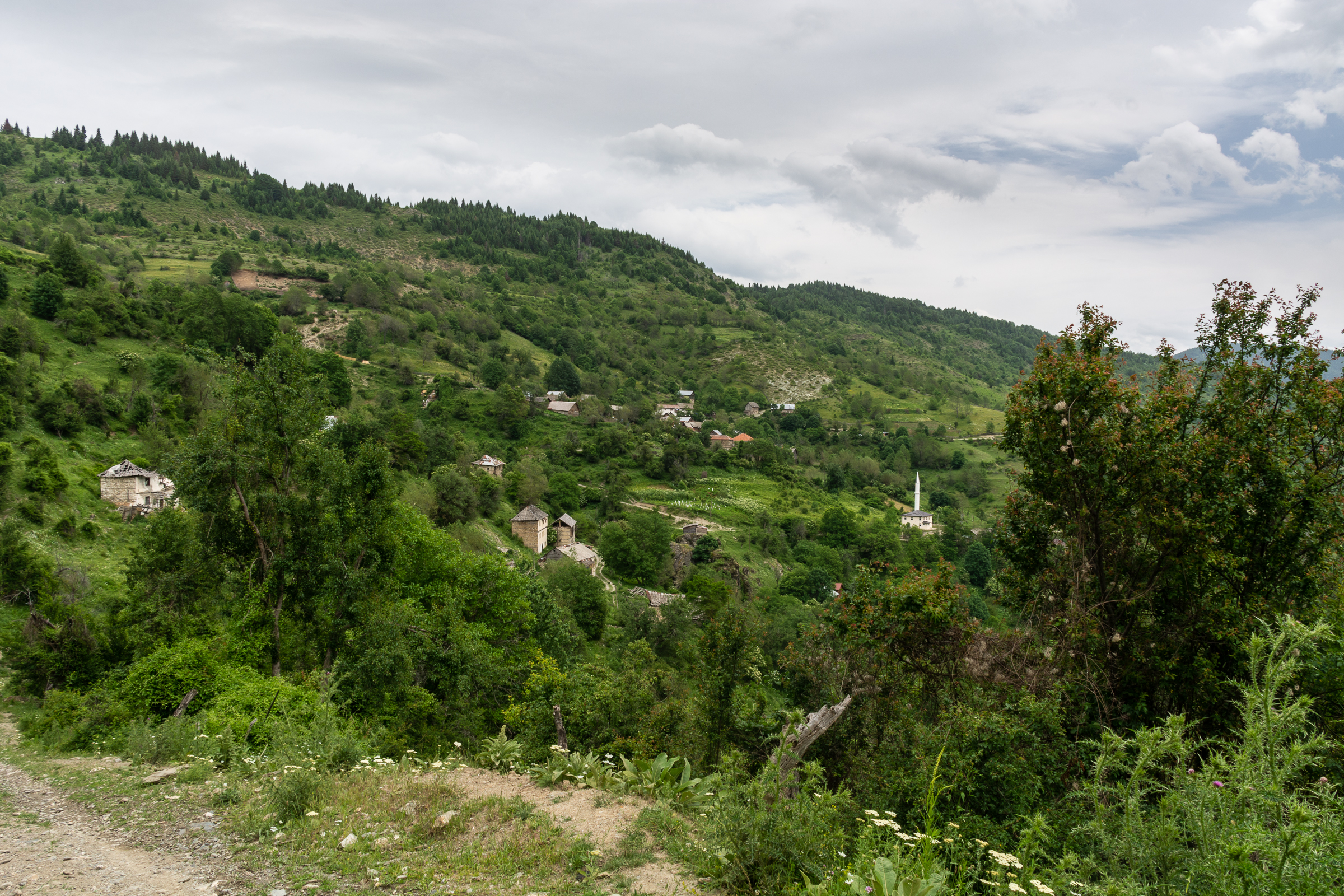 Село Нистрово